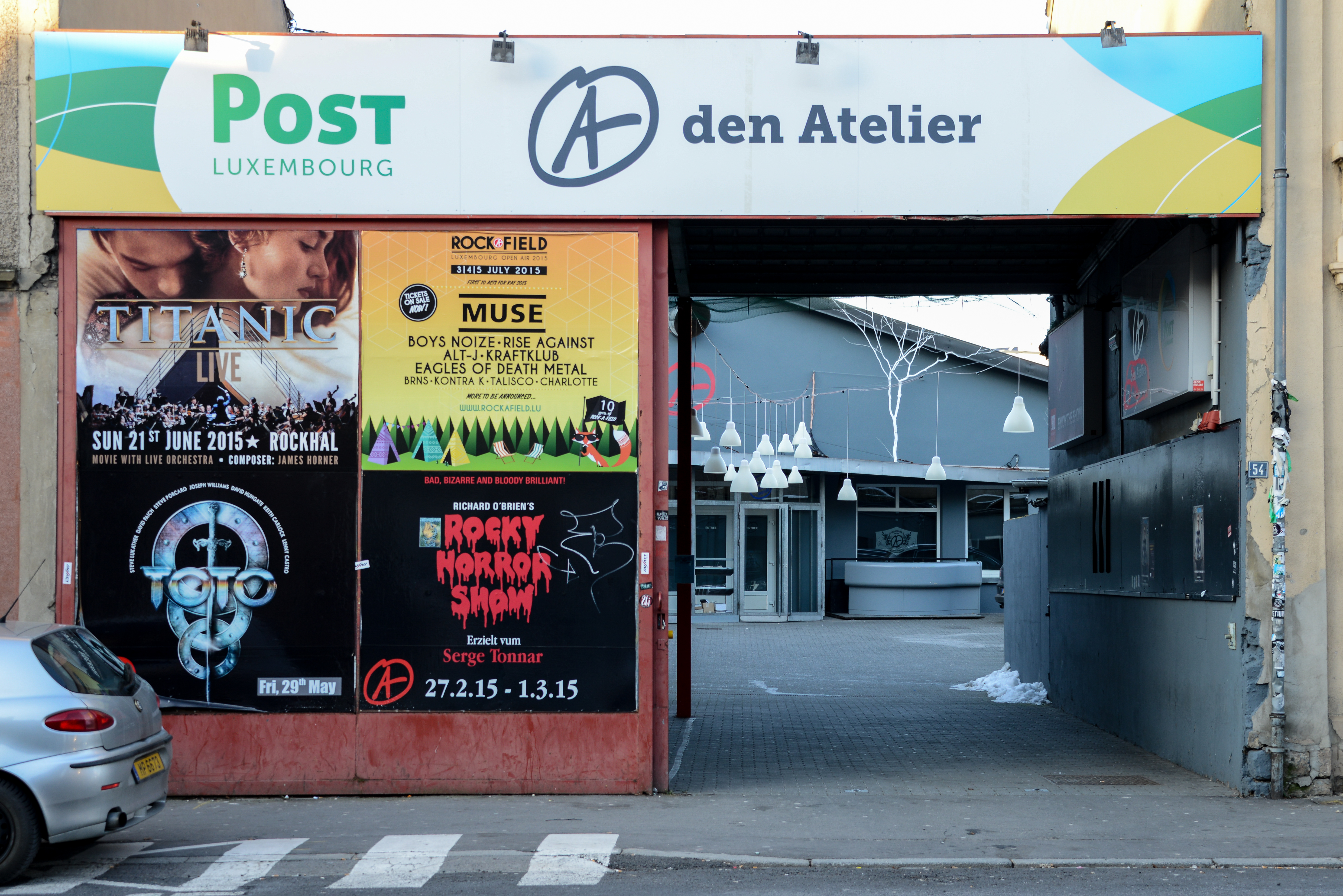 "Den Atelier" an der Hollerecherstrooss op der Gare.